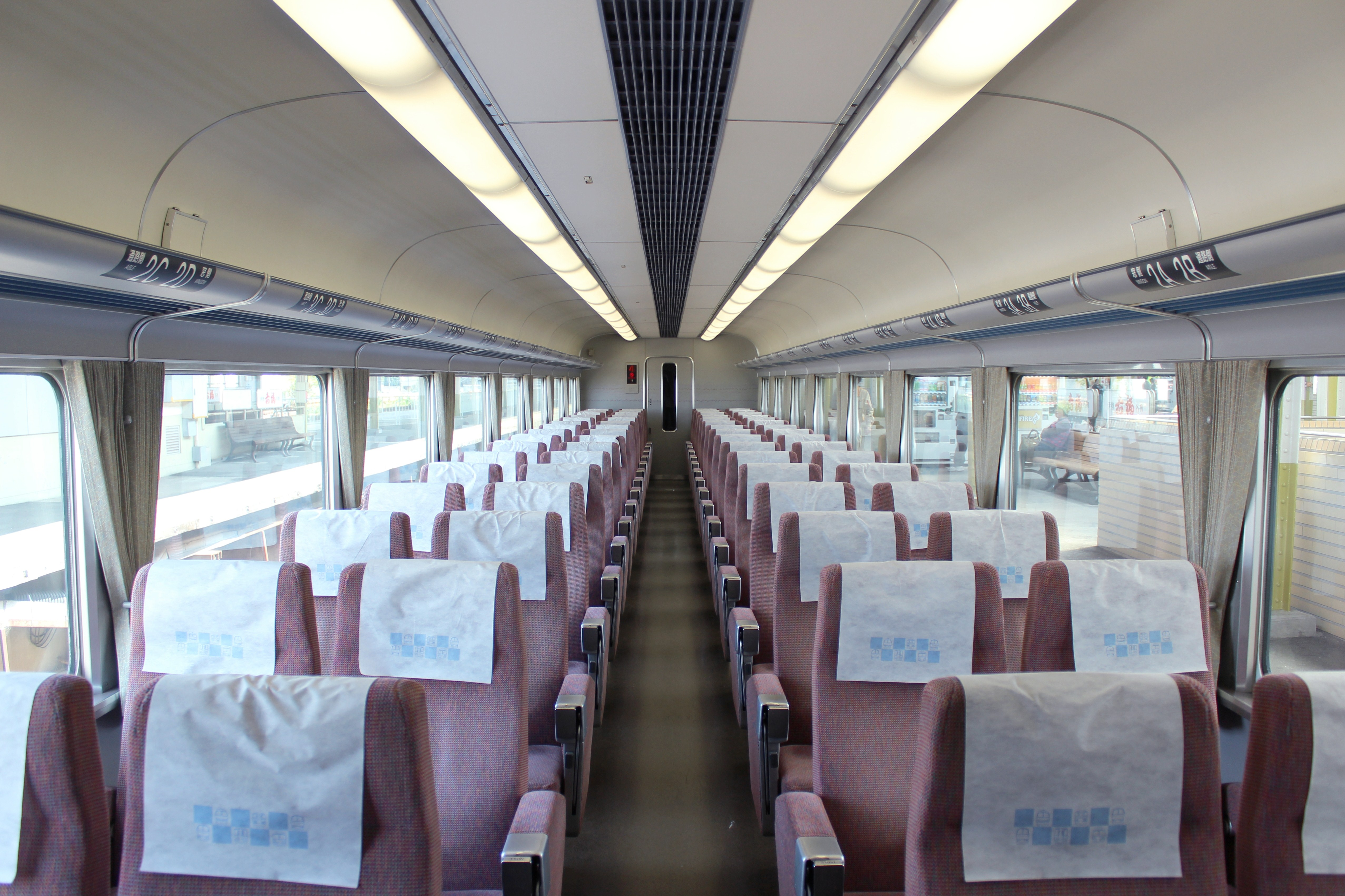 近鉄12410系更新車の車内